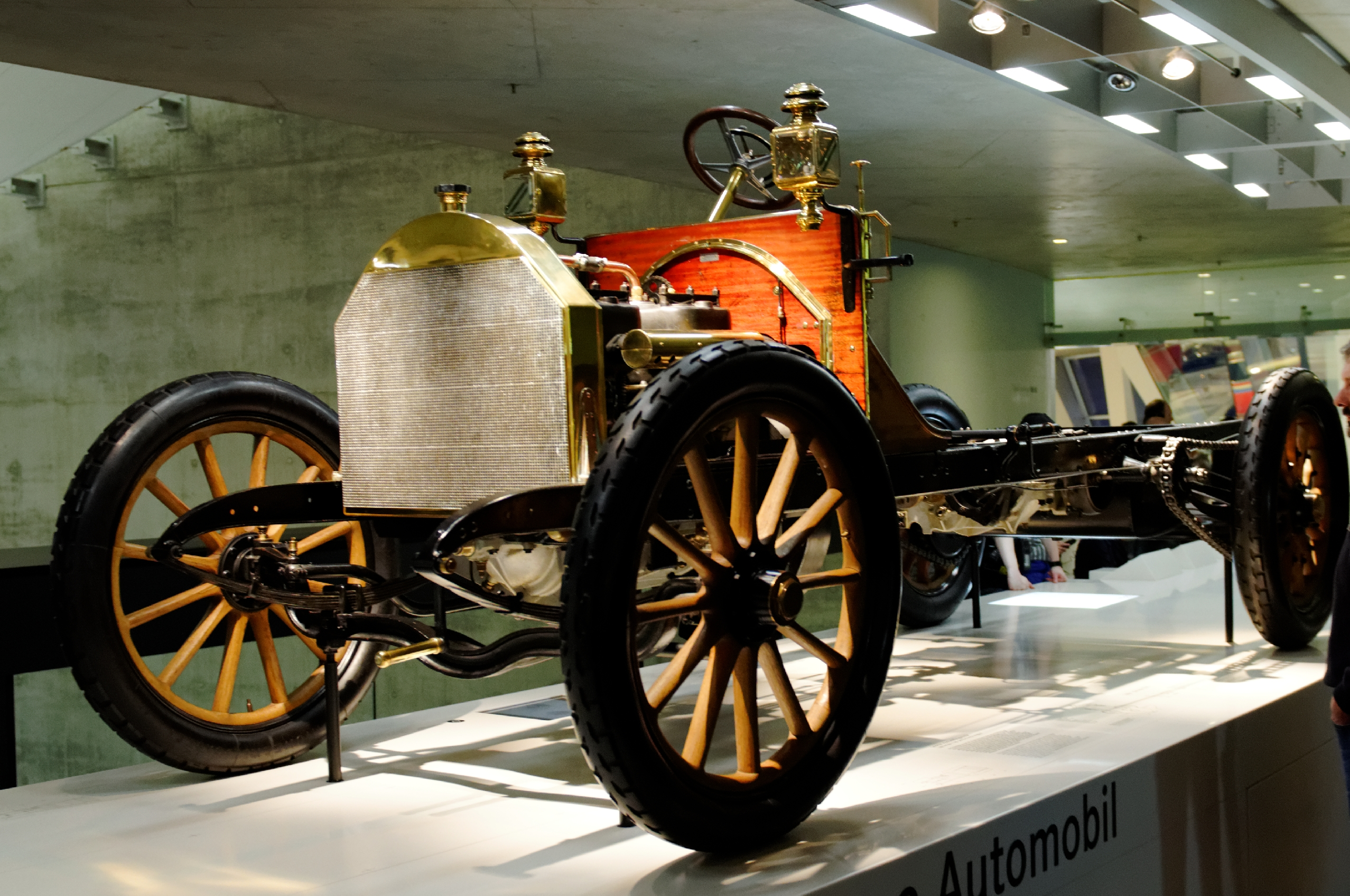 Bilder aus dem Mercedes-Benz-Museum 2015